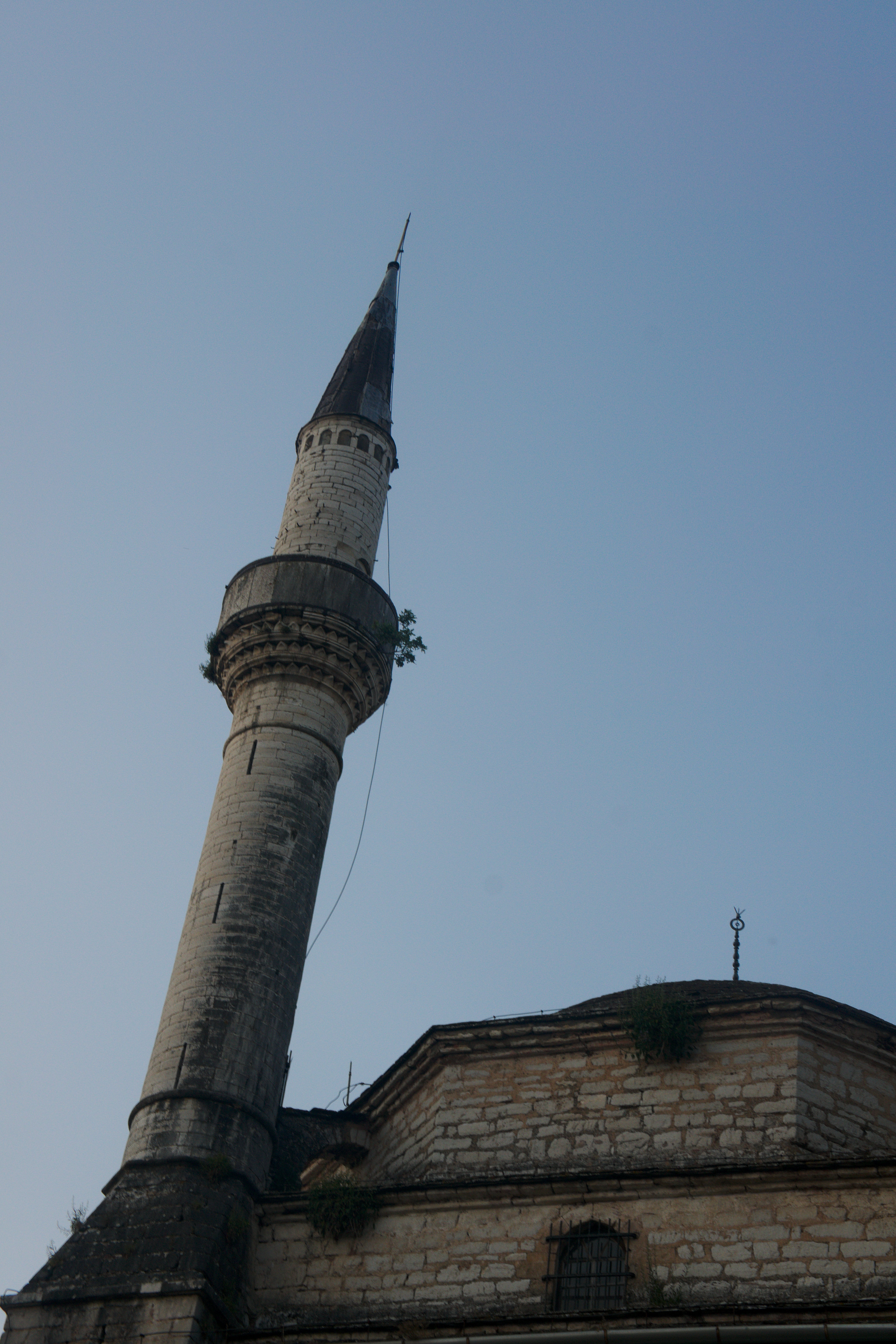 Minaret de la mosquée Aslan Pasha à Ioannina en Grèce .